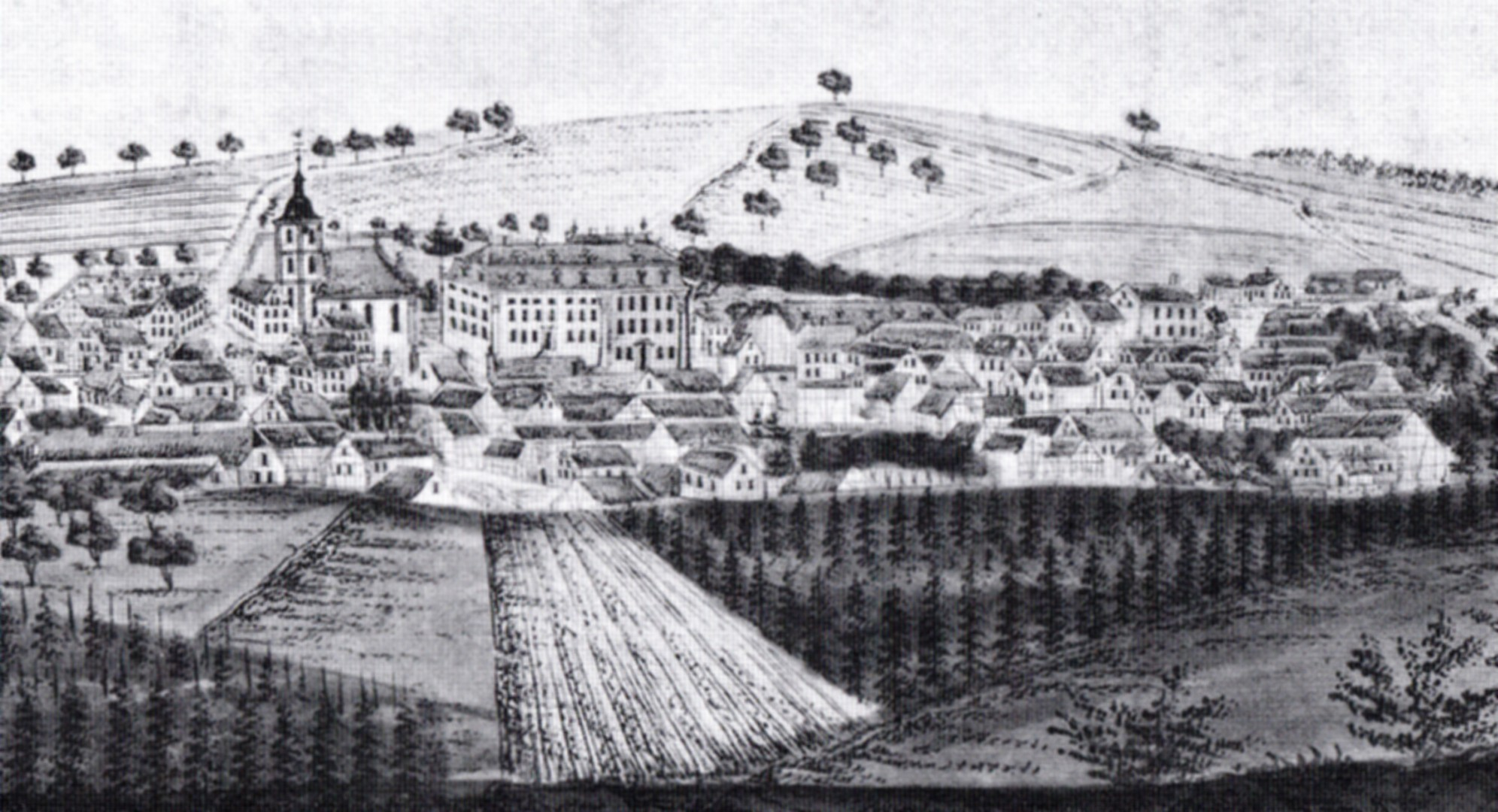 Obbach 1863 - Zeichnung von Max Asten